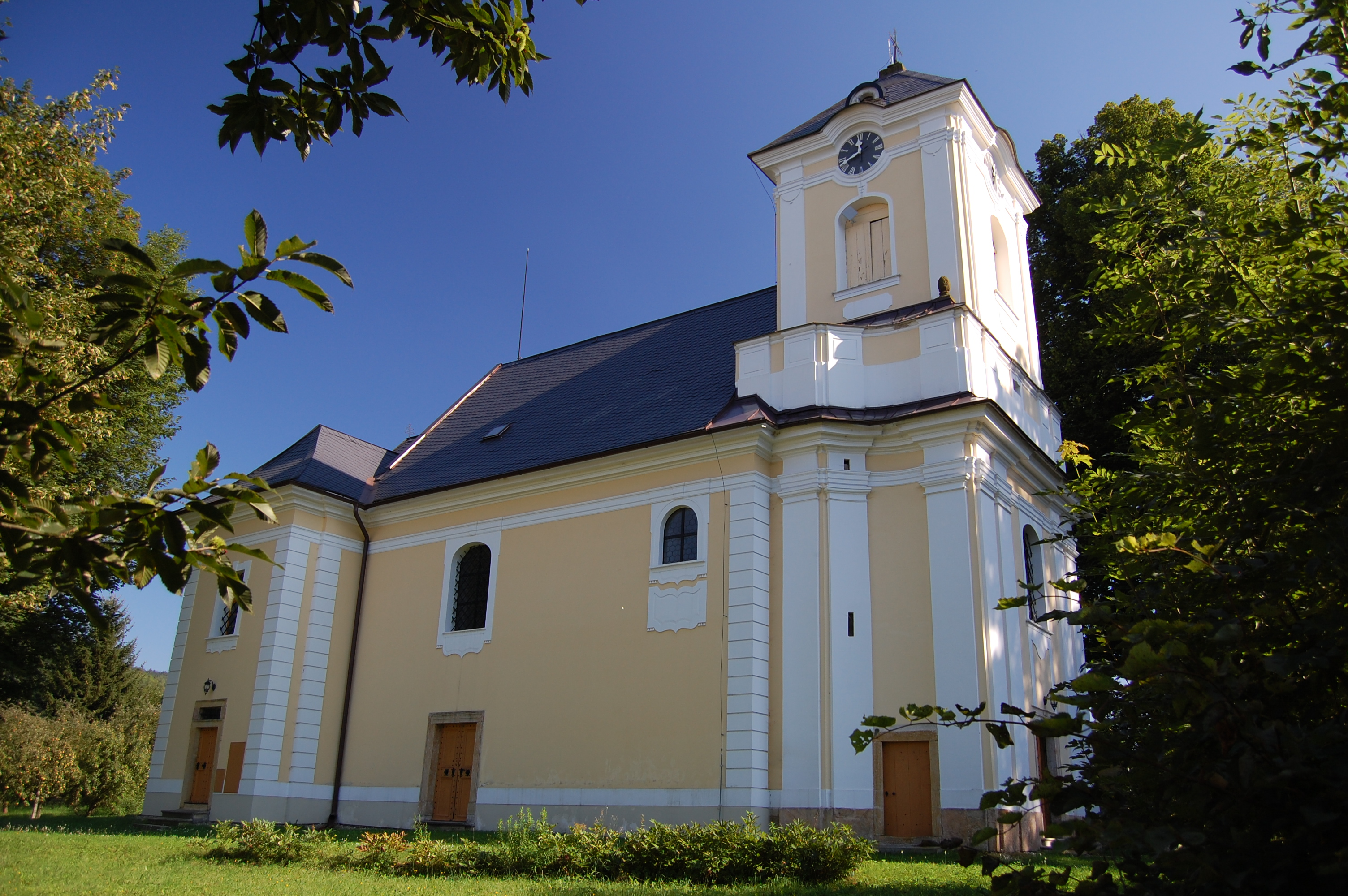 Kostel svatého Petra a Pavla, Biskupice, okres Svitavy